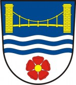 Stádlec